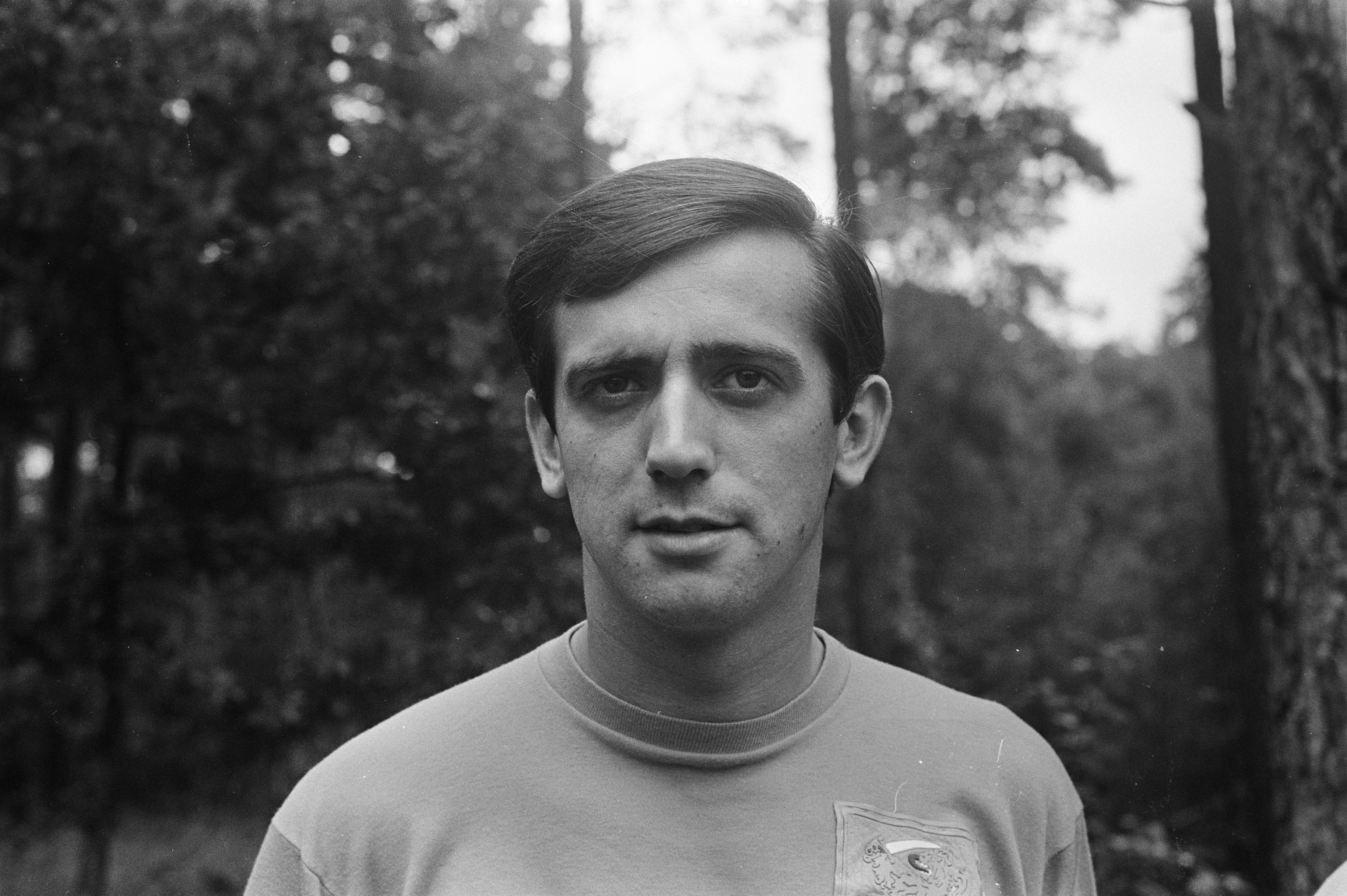 Collectie / Archief : Fotocollectie Anefo Reportage / Serie : Training van het Nederlands elftal in Zeist Beschrijving : Willy van der Kuylen Annotatie : Datum : 29 augustus 1968 Locatie : Utrecht, Zeist Trefwoorden : portretten, voetbal Persoonsnaam : van der Kuylen, Willy Fotograaf : Fotograaf Onbekend / Anefo Auteursrechthebbende : Nationaal Archief Materiaalsoort : Negatief (zwart/wit) Nummer archiefinventaris : bekijk toegang 2.24.01.05 Bestanddeelnummer : 921-6343